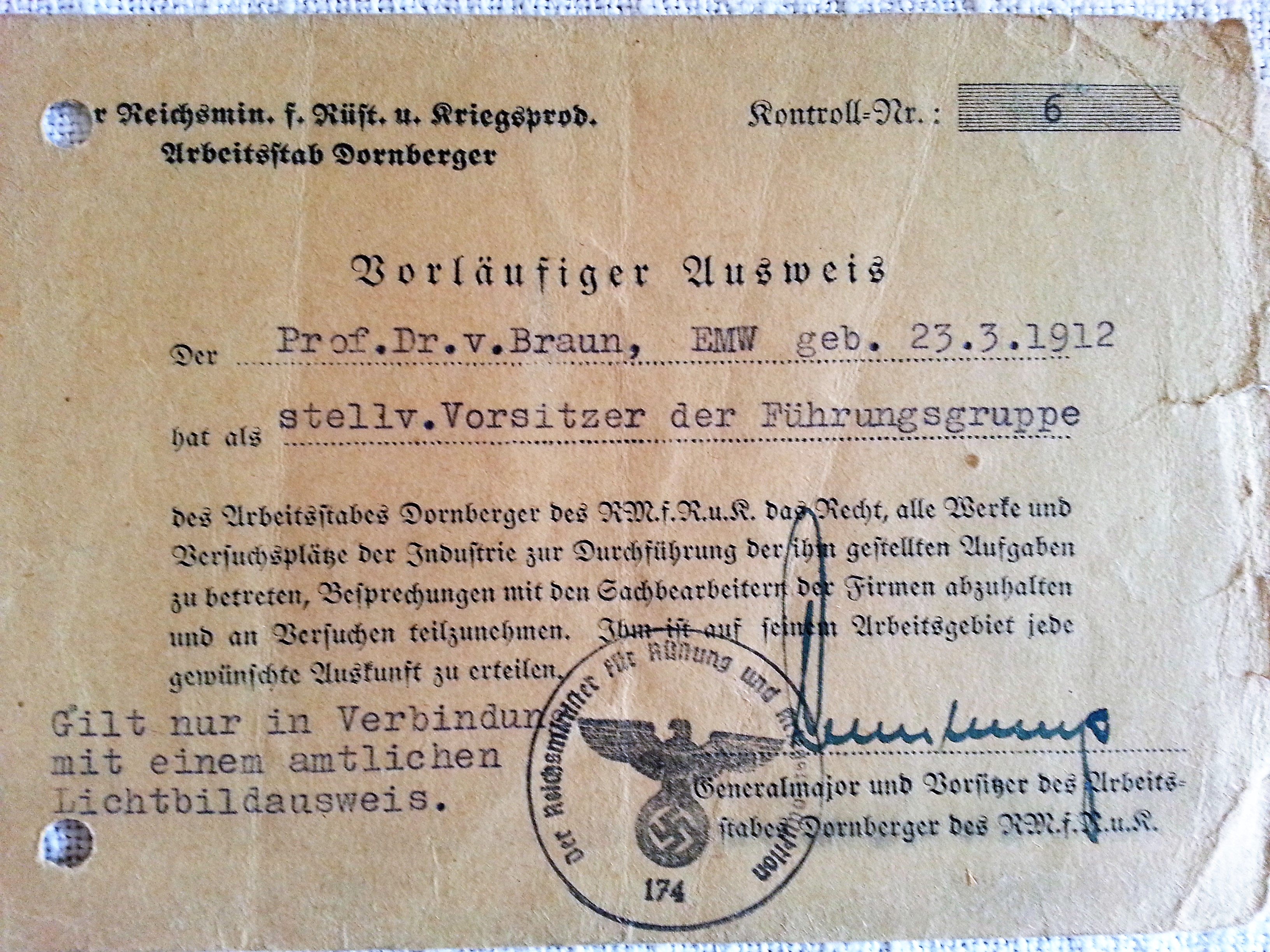 Пропуск Вернера фон Брауна на полигон Пенемюнде. Хранился у секретаря фон Брауна Ирмтраут Вэгер (Irmtraut Wäger), сфотографирован Артёмом Хачатуровым в 2012 году